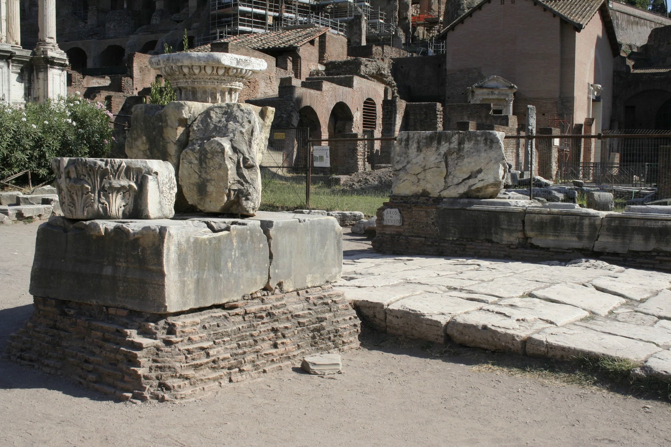 Arc d'Auguste (arc des Parthes ?). Passage central. Vestiges d'un chapiteau dorique qui décorait les passages latéraux et d'un chapiteau corinthien qui décorait la baie centrale.